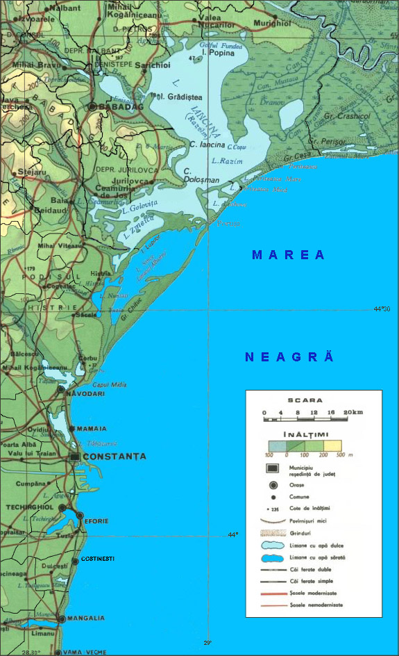 Limanele dobrogene, realizare care preia părți din fondul topografic al Hărților Județelor RSR (1975), actualizate